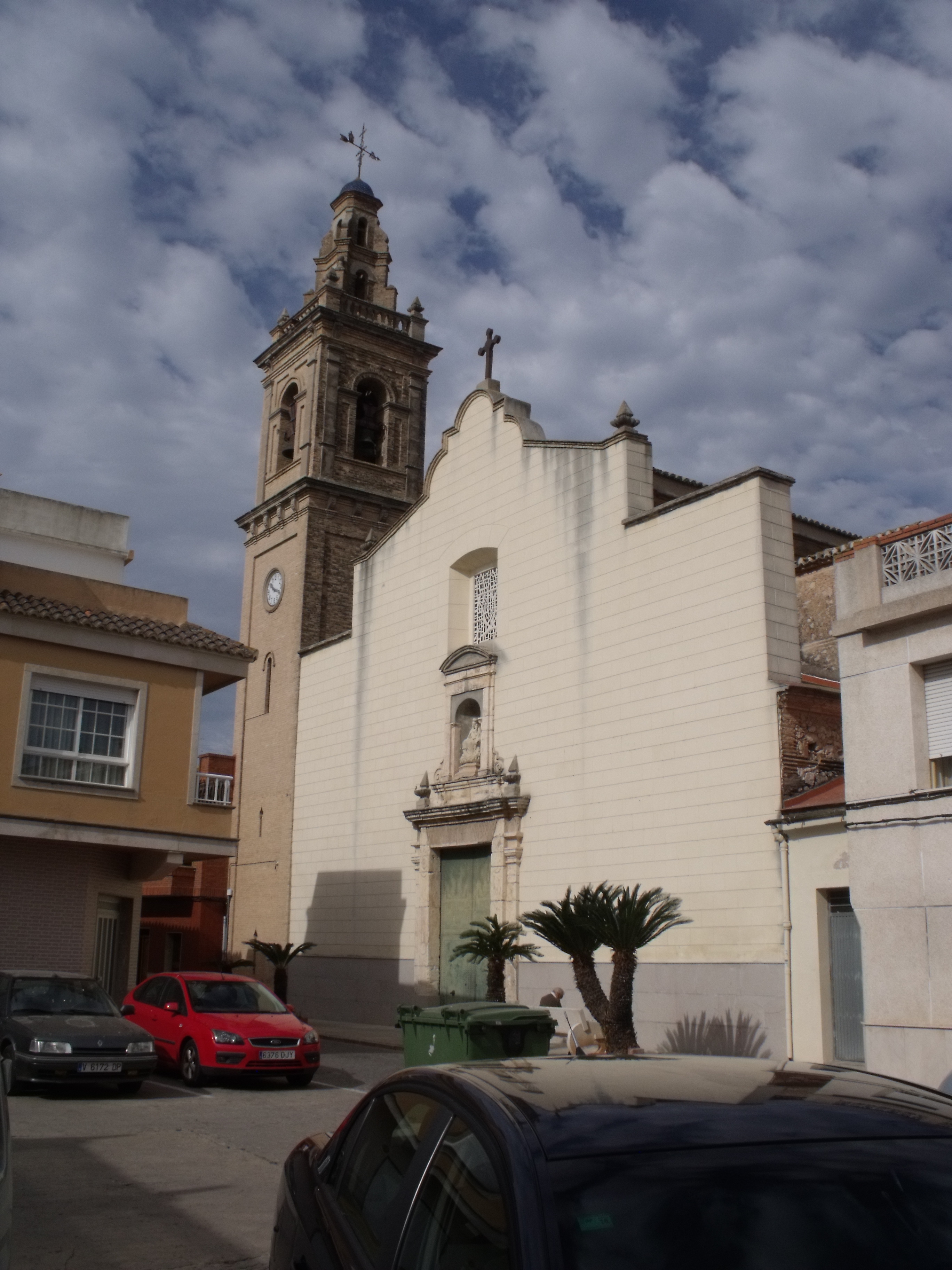 Vista general de la iglesia parroquiall